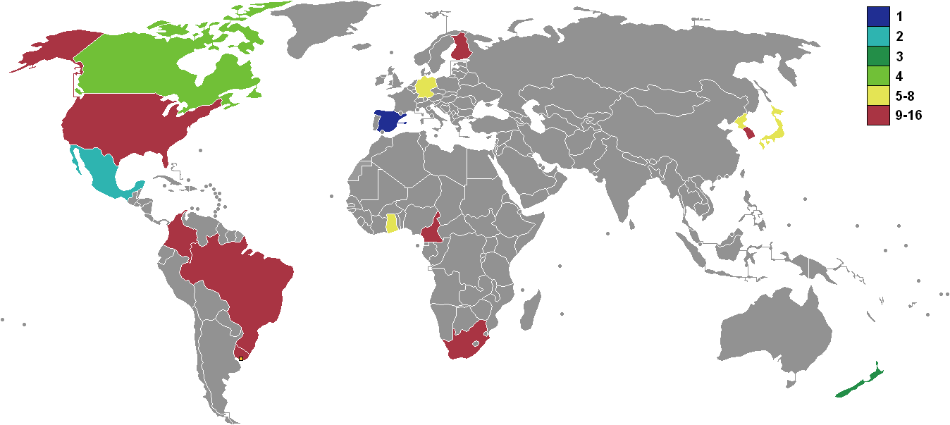 Mapa de la Copa mundial de futbol U-17 femenino 2018